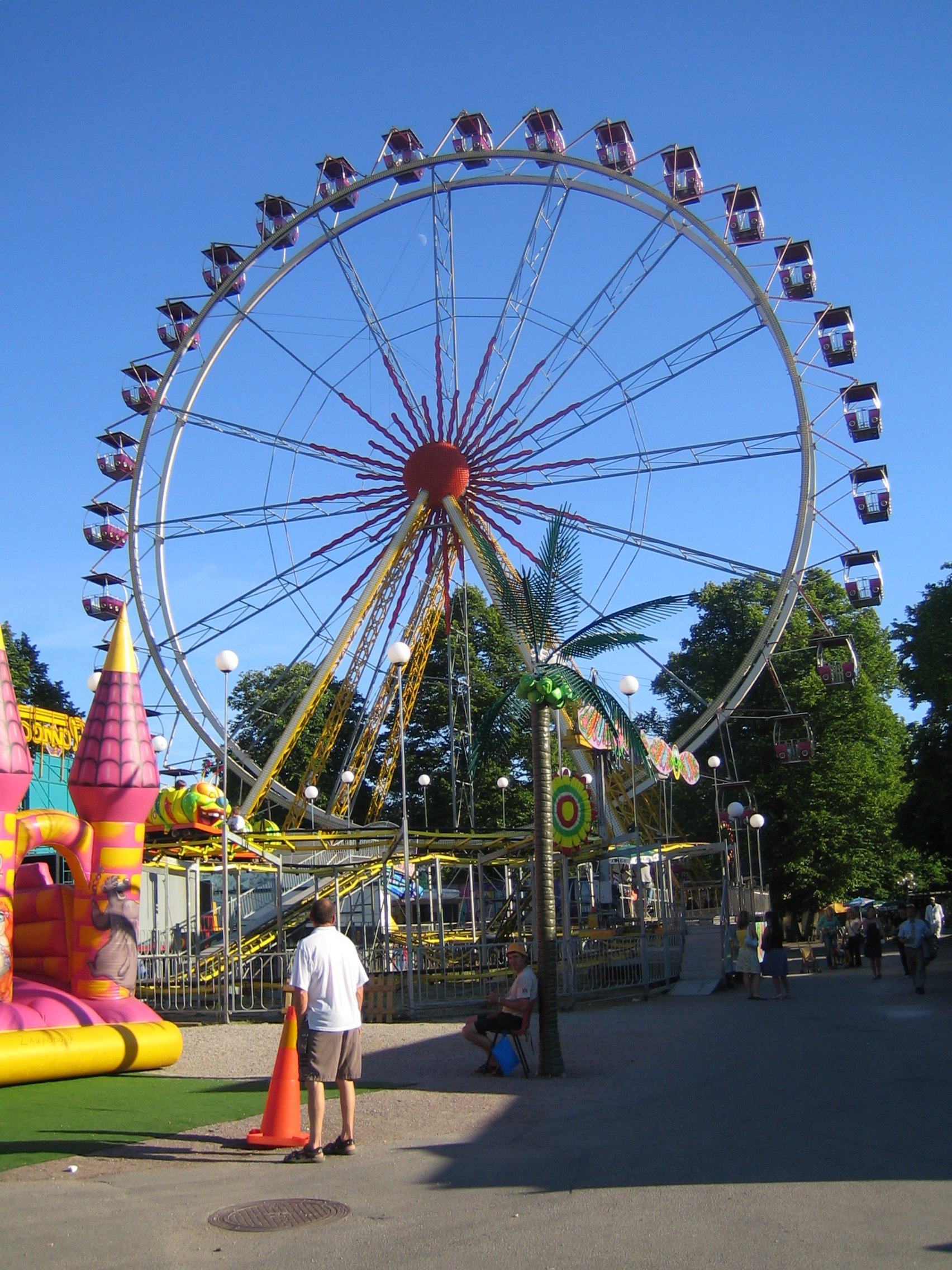 Ferris wheel at Folkets Park in Malmö, Sweden.